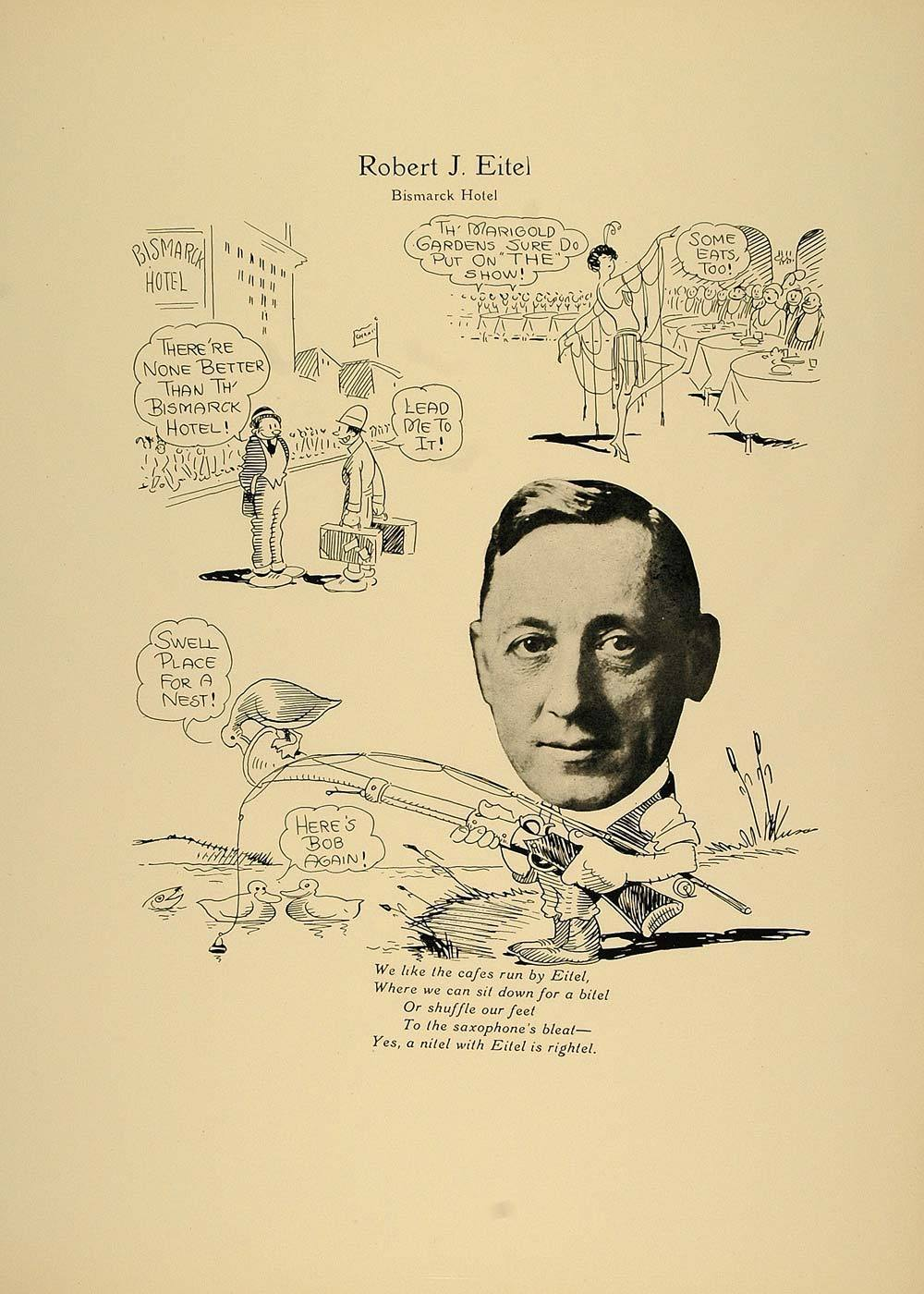 Porträt von Robert Eitel auf einer Werbepostkarte für das Bismarck Hotel in Chicago, * 16. Juni 1877 Stuttgart, + 1948, in den 1920er Jahren Leiter des „Bismarck Hotels“, das seinen Brüdern Emil und Karl Eitel gehörte.